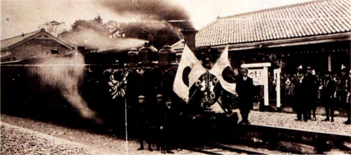 1908年（明治41年）11月16日開業当時の魚津駅ホーム